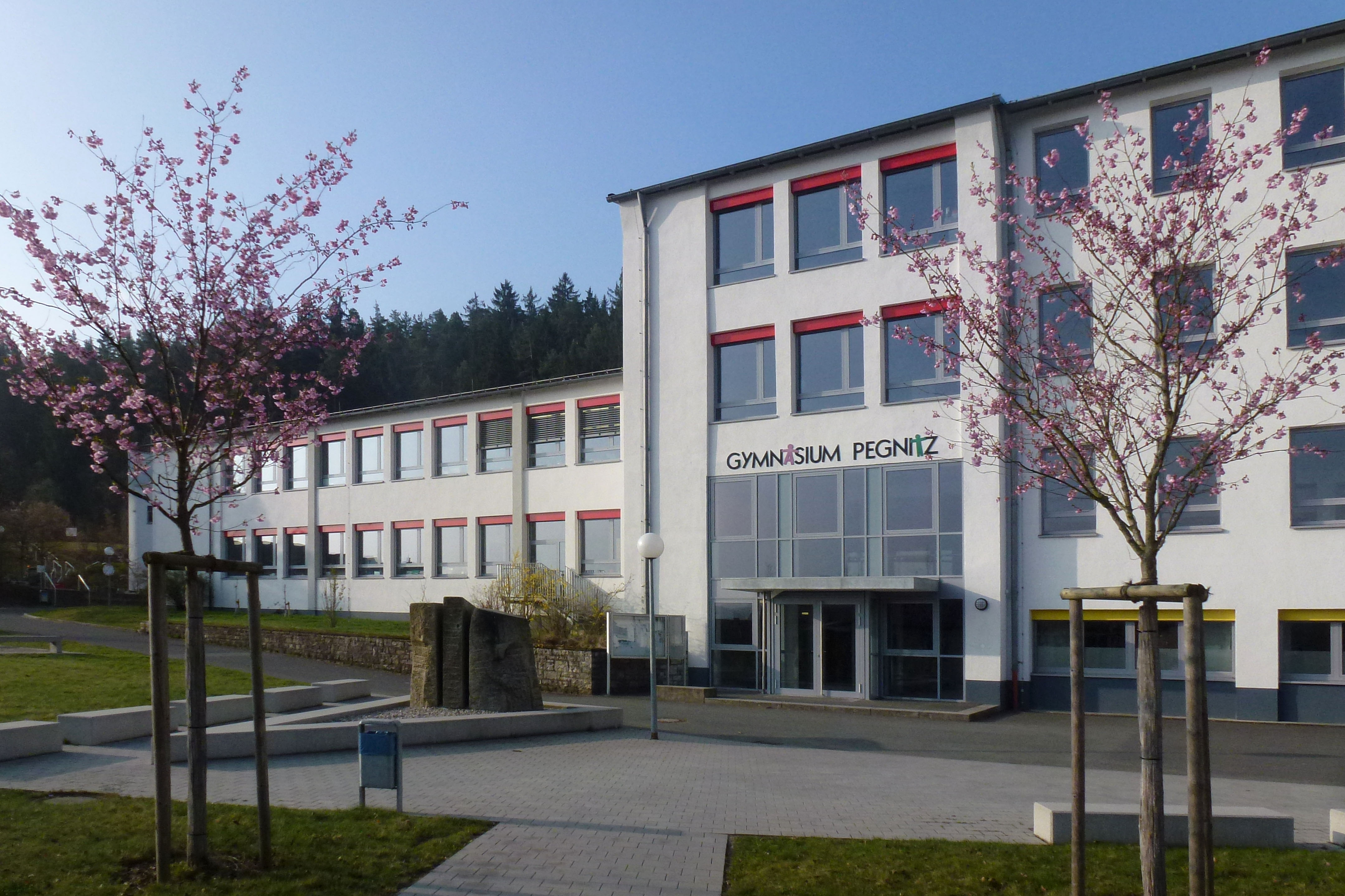 Ansicht des Haupteingangs des Gymnasiums mit Schülerheim Pegnitz